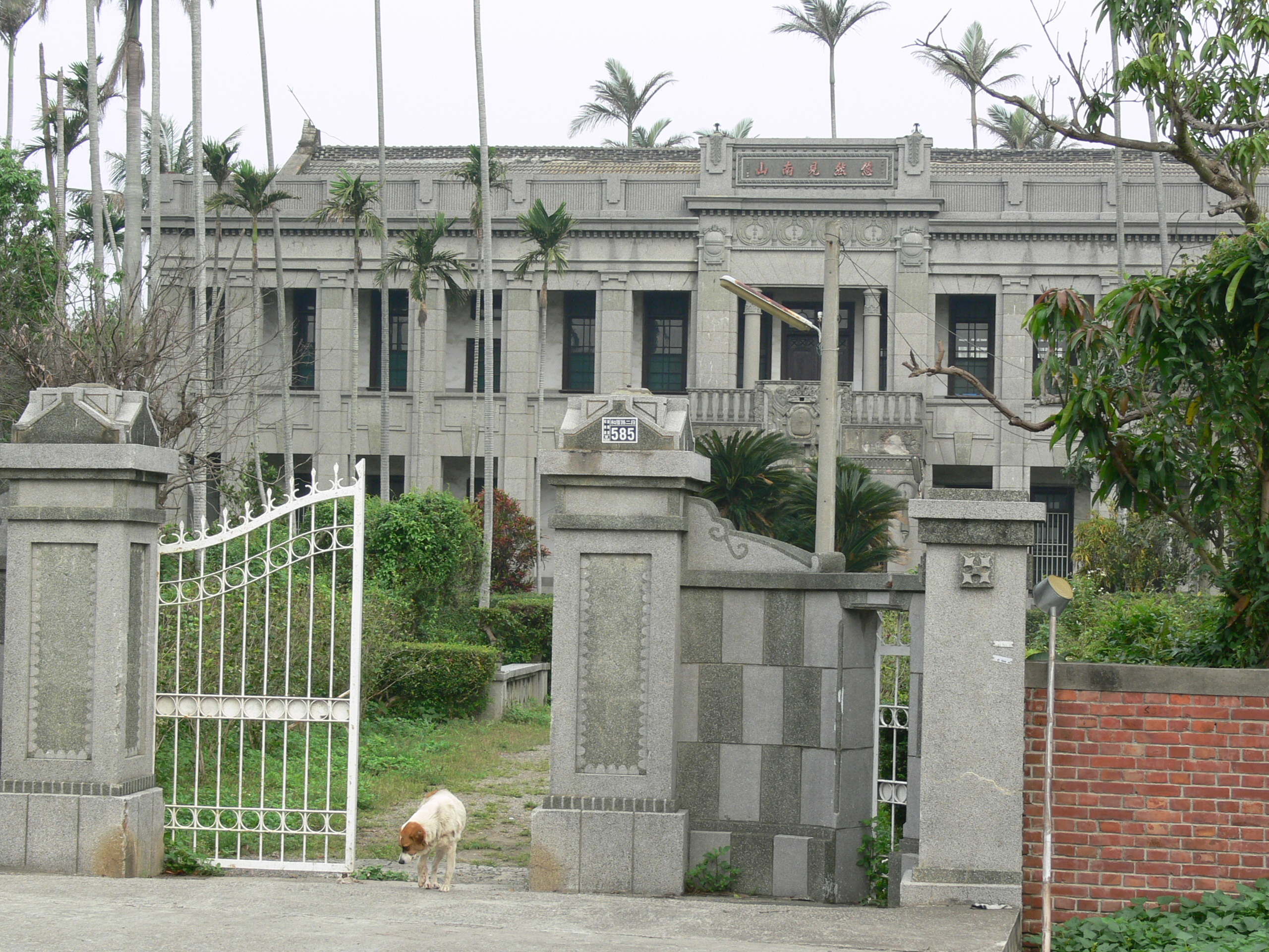 彰化縣和美鎮陳家默園，是陳虛谷故居，位於彰化縣和美鎮和厝路二段585號。